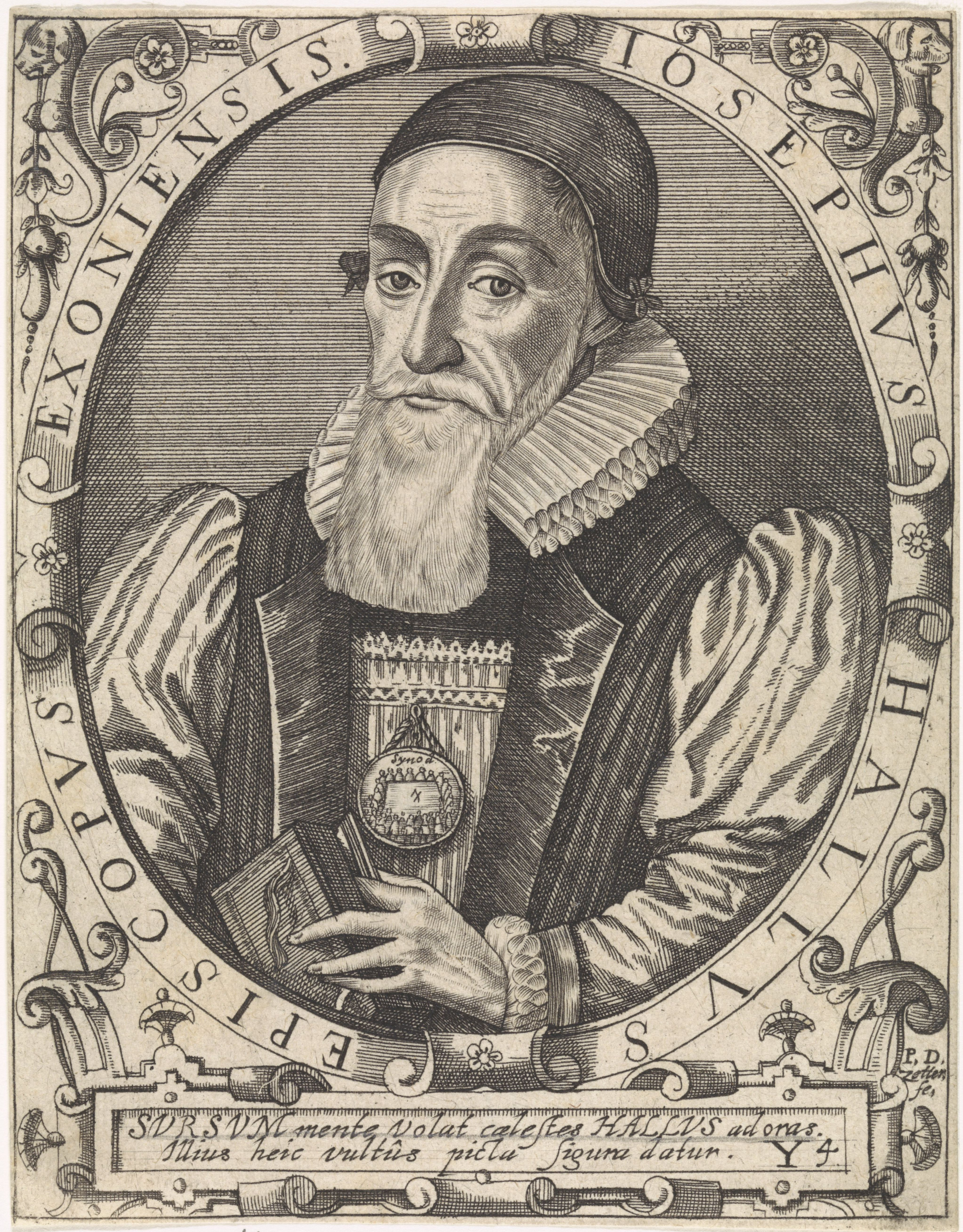 IdentificatieTitel(s): Portret van Joseph HallPortretten van beroemde Europese wetenschappers, humanisten en geestelijken (serietitel)Objecttype: prent boekillustratie Objectnummer: RP-P-1905-266Catalogusreferentie: Hollstein Dutch 22-2(2)Opschriften / Merken: verzamelaarsmerk, verso, gestempeld: Lugt 2228Omschrijving: Portret van Joseph Hall, Engels bisschop. Rechtsonder genummerd: Y4.VervaardigingVervaardiger: prentmaker: Paul de Zetter (vermeld op object)Plaats vervaardiging: DuitslandDatering: 1650 - 1669Fysieke kenmerken: ets en gravureMateriaal: papier Techniek: etsen / graveren (drukprocedé)Afmetingen: blad: h 133 mm × b 104 mmToelichtingPrent gebruikt in een van de edities van Jean-Jacques Boissard. Boissard, Jean-Jacques. Bibliotheca sive Thesaurus Virtutis et Gloriae: In quo continentus Illvstrivm Ervditione & doctrina Virorum Effigies & Vitae (...). Frankfurt, [1628]. Zie Hollstein Dutch, deel LVIII, p. 86-87.OnderwerpWat: beardWie: Joseph HallVerwerving en rechtenCredit line: Schenking van de heer C. ScheiblerVerwerving: schenking 1905Copyright: Publiek domein